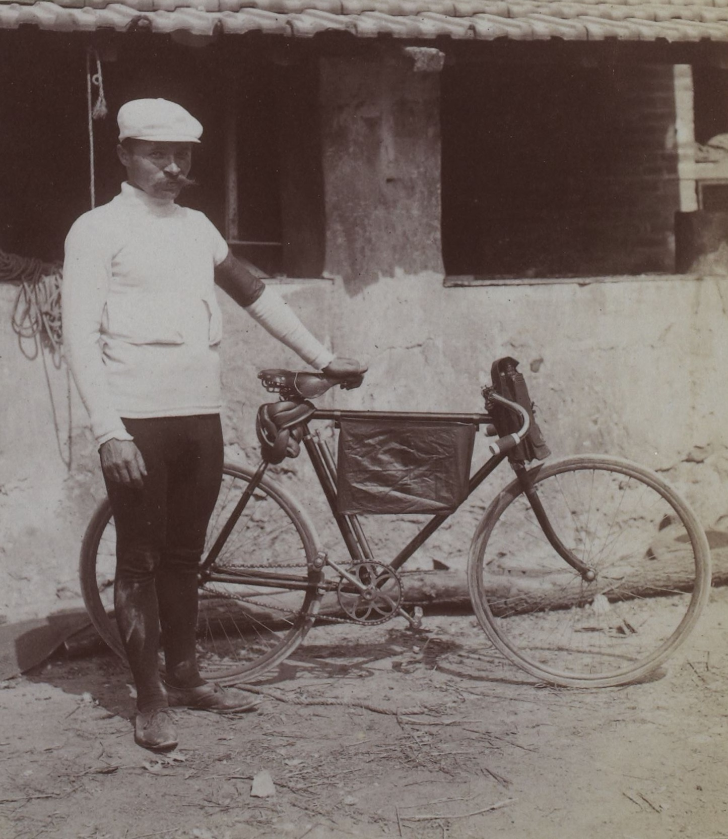 [Collection Jules Beau. Photographie sportive] : T. 22. AnnÃ©e 1903 / Jules Beau : F. 18v. Tour de France, 1er - 19 juillet 1903